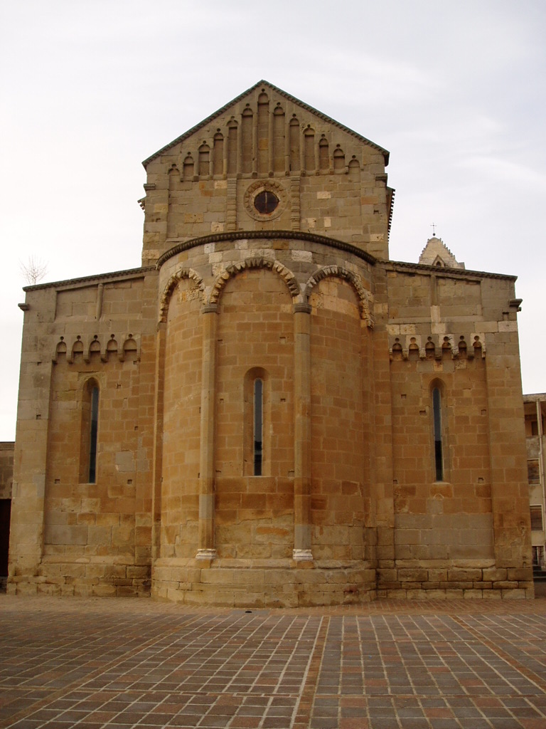 Chiesa di San Pantaleo, a Dioanova, ex cattedrale della soppressa diocesi di Dolia.